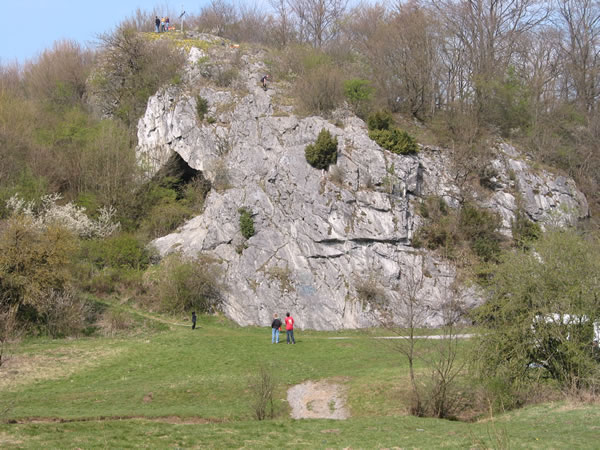 Gesamtansicht der Kulturhöhle „Hohler Stein“ im Lörmecketal bei Rüthen-Kallenhardt.